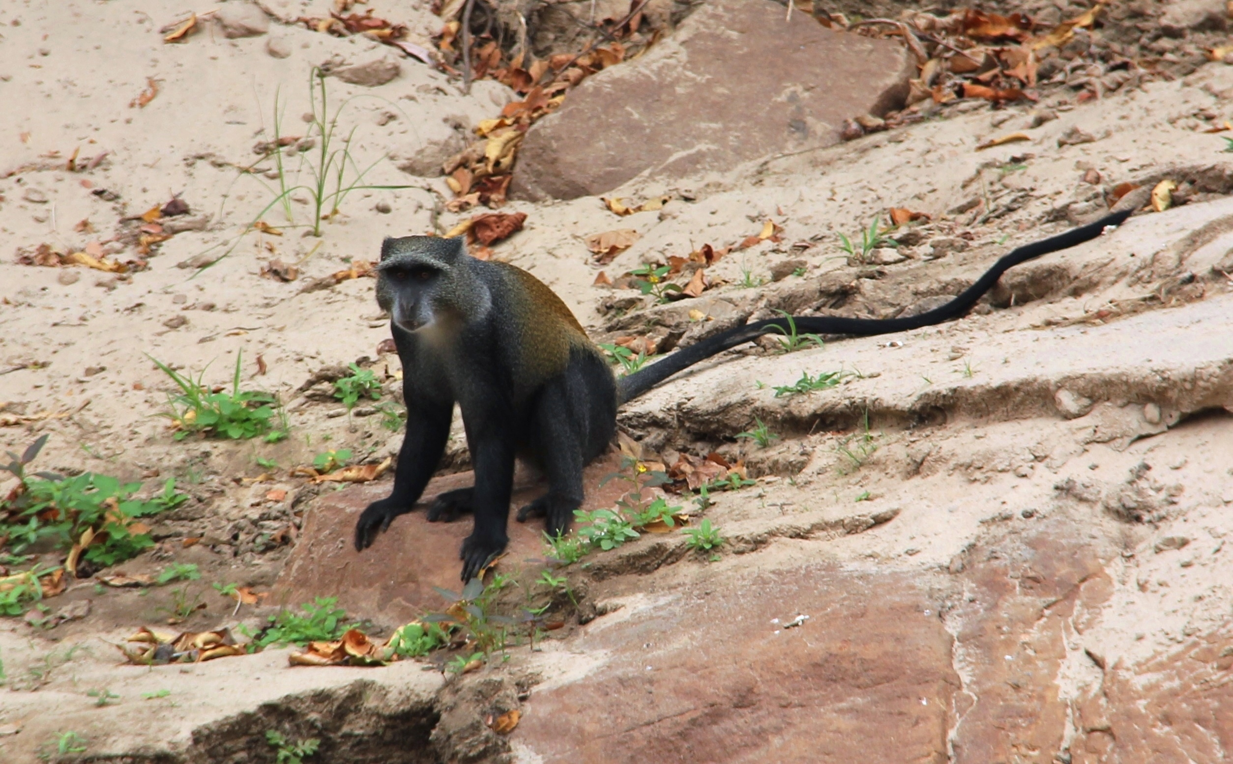 Blue monkey in Tanzania